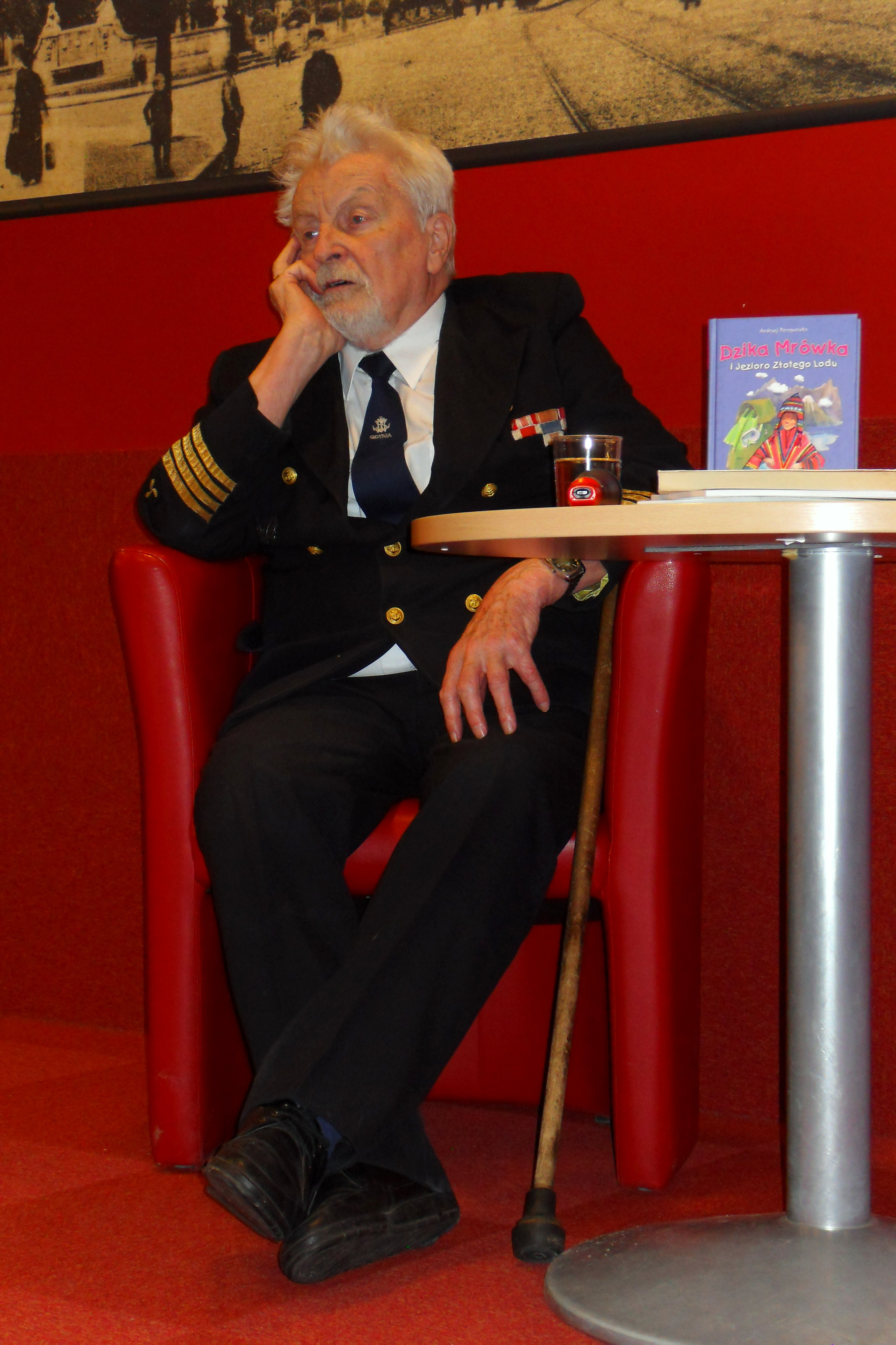 Andrzej Perepeczko, pisarz i publicysta.